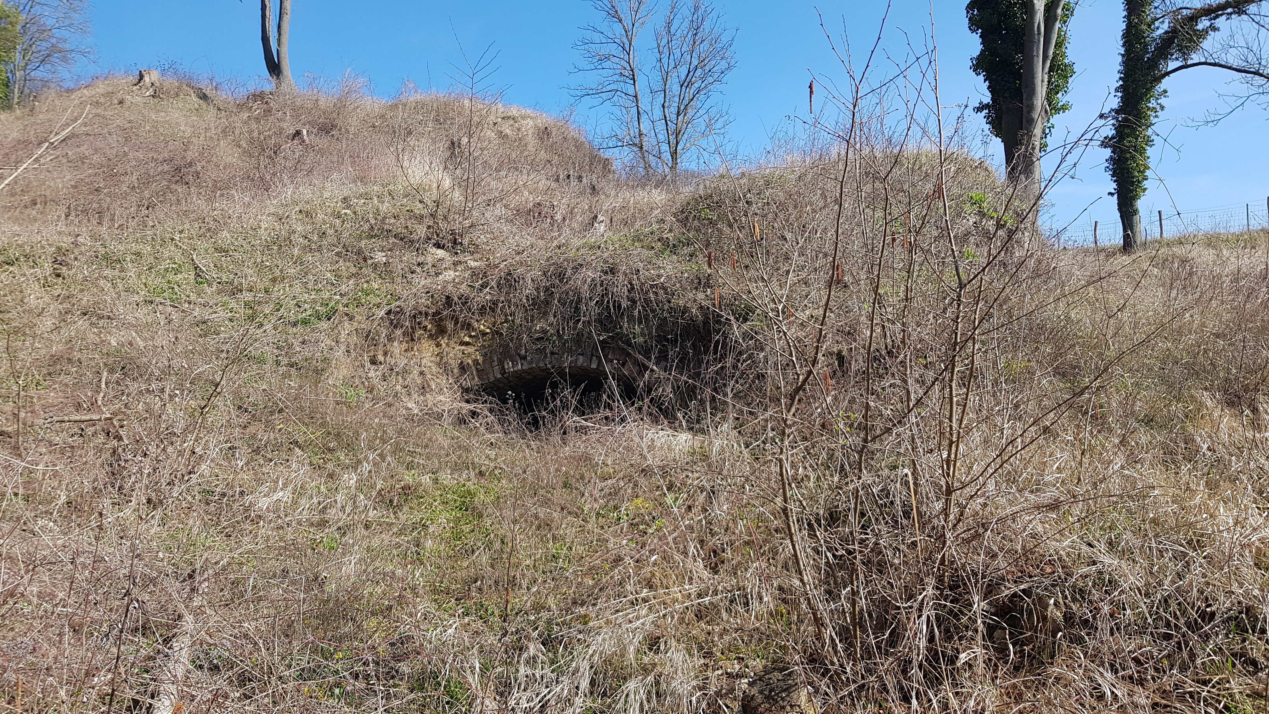 Kalkoven Schaelsberg, Oud-Valkenburg, Valkenburg aan de Geul, Nederland